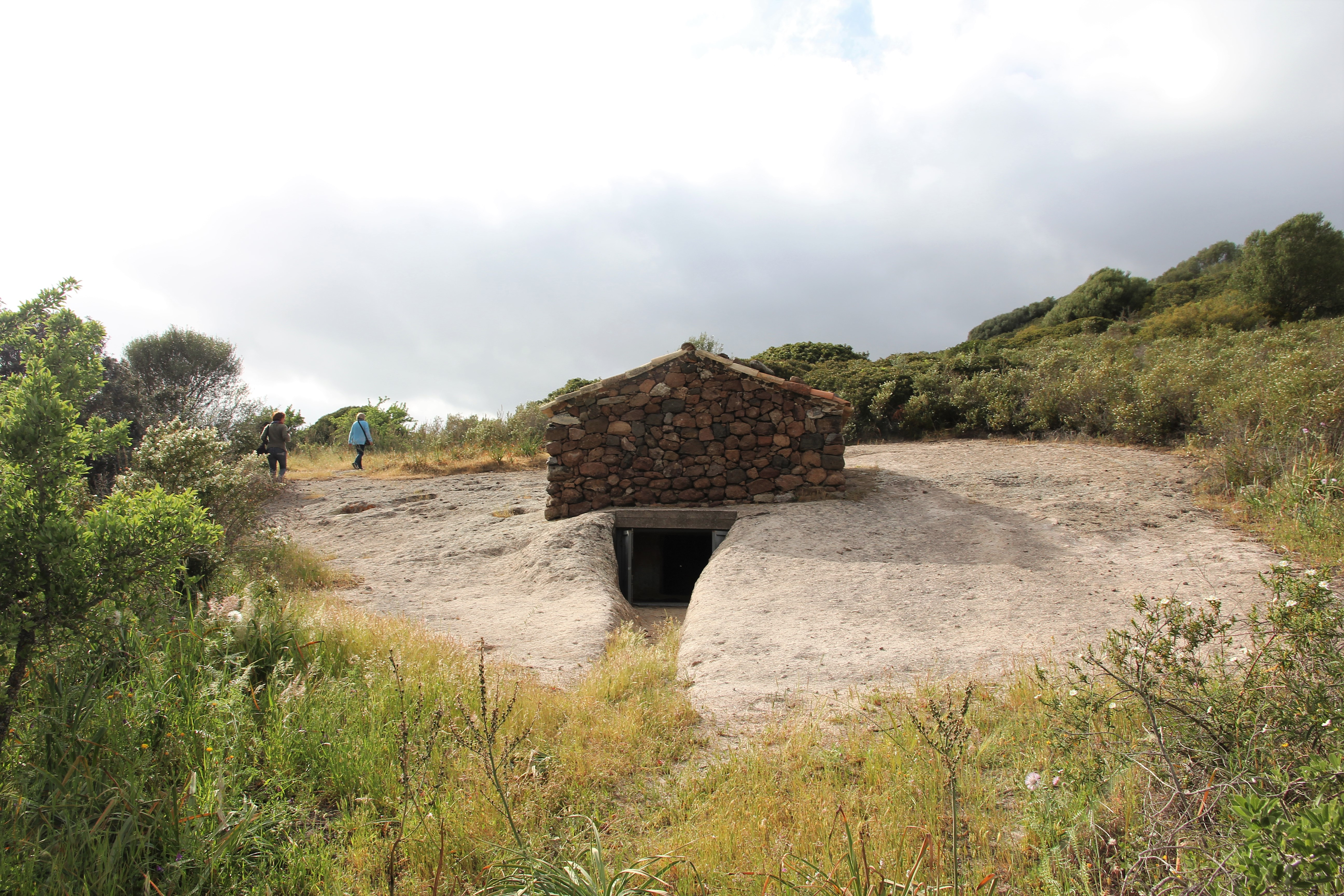 Putifigari, necropoli di Monte Siseri